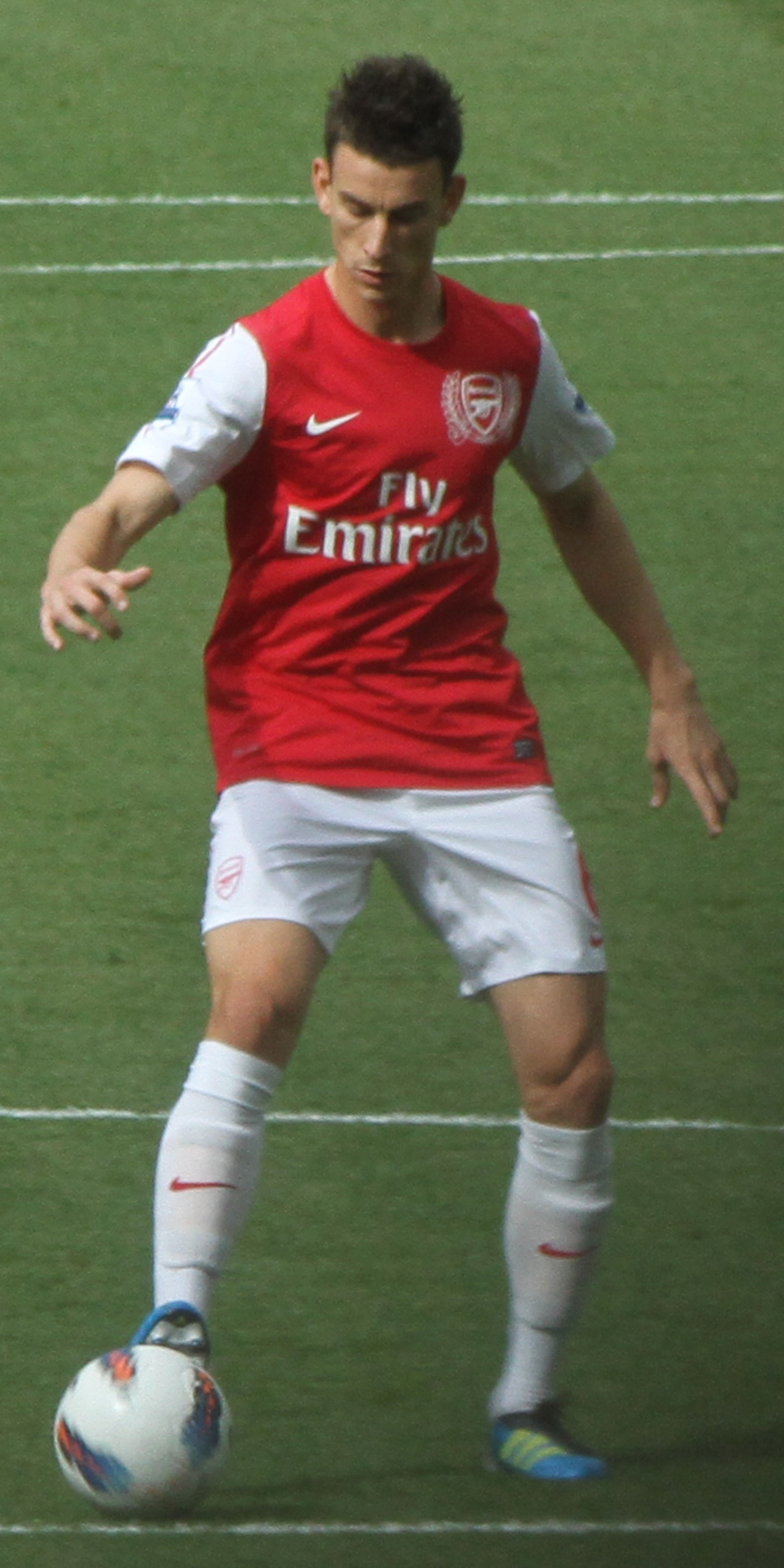 Laurent Koscielny